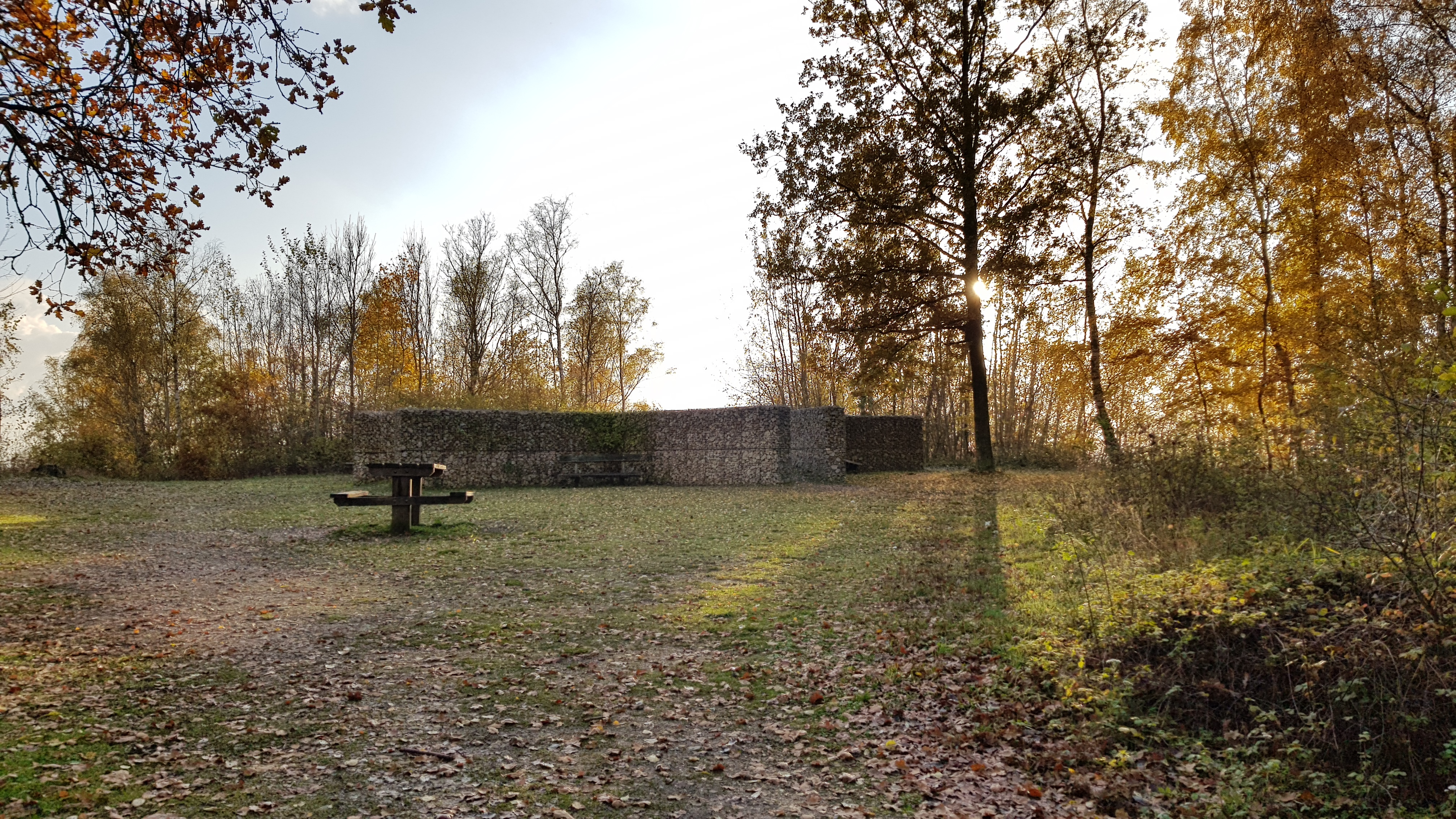 bovenop D'n Observant, Sint-Pietersberg, Maastricht, Nederland